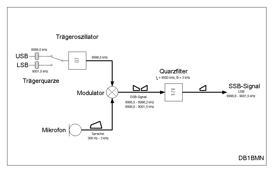 Darstellung der Frequenzlagen bei der SSB-Signalerzeugung.